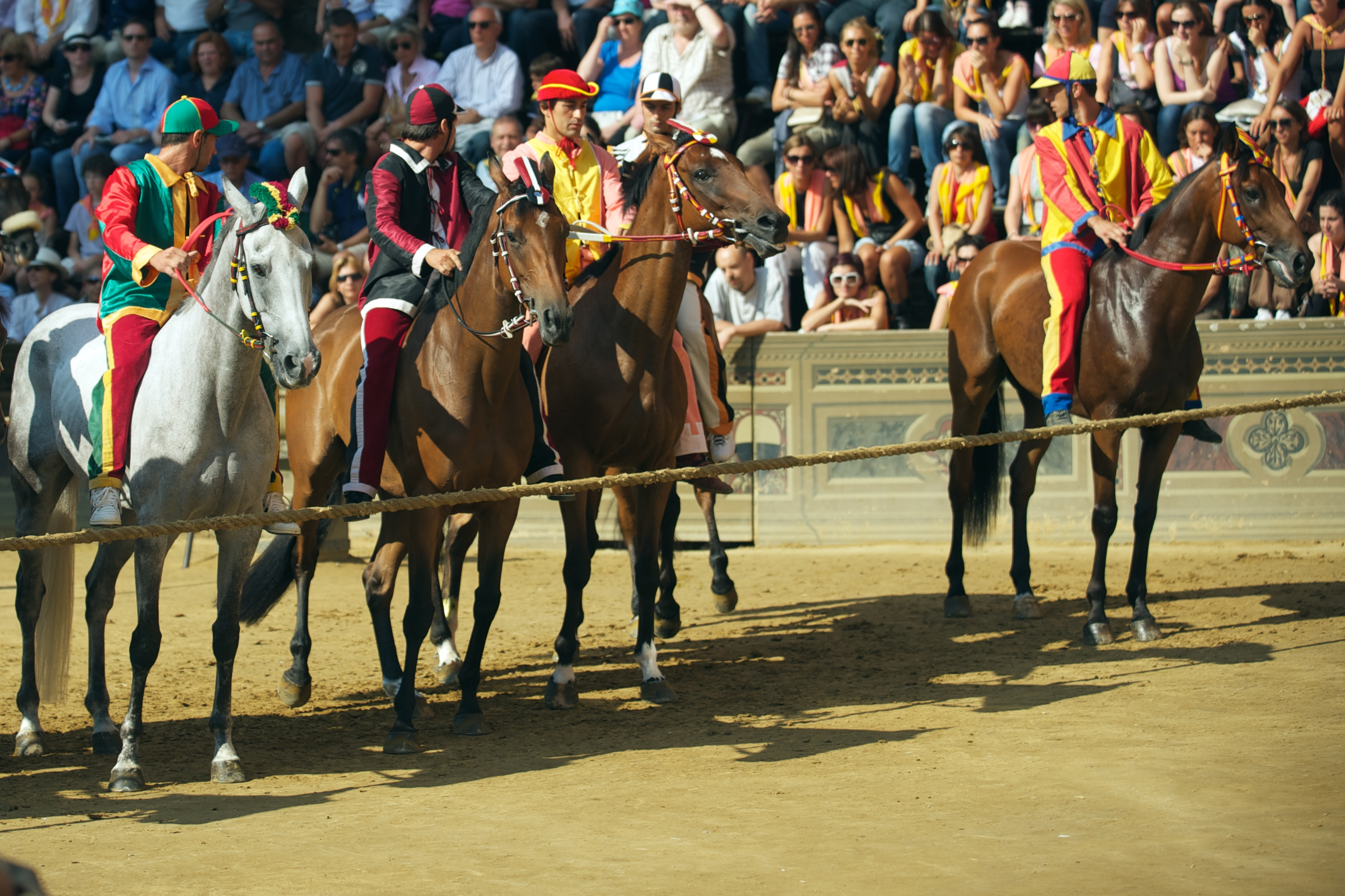 Quarta prova del Palio di Siena del 2 luglio 2011.